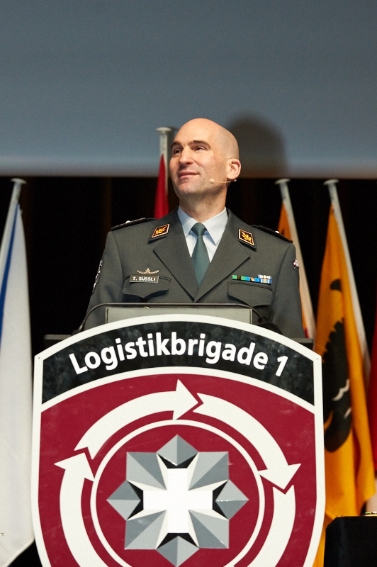 Brigadekommandant Thomas Süssli am Jahresrapport 2016